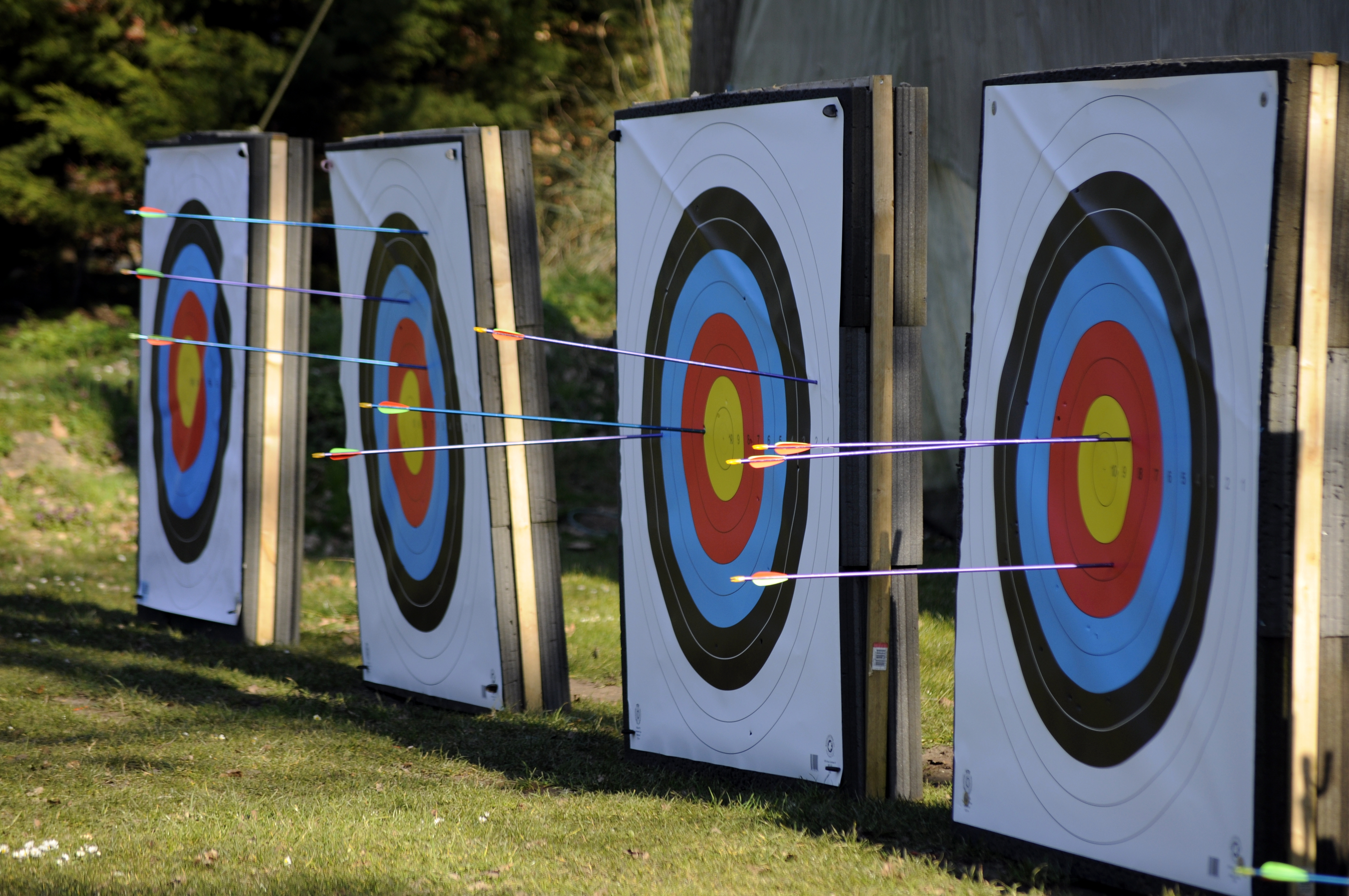 Archery